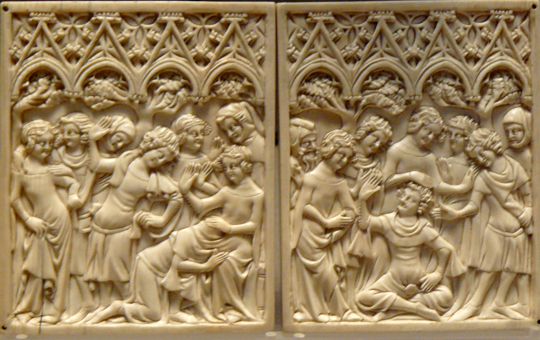 Tablettes à écrire en ivoire sculpté - Jeux de « haute coquille » et de « la grenouille », Paris, milieu du XIVe siècle - Chaque élément environ 8x12 cm - Musée du Louvre, legs de Charles Davillier 1883 - n° Inv. OA 2762